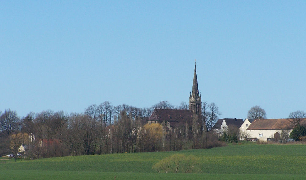 Blick in Richtung Storcha, Kirche.2007